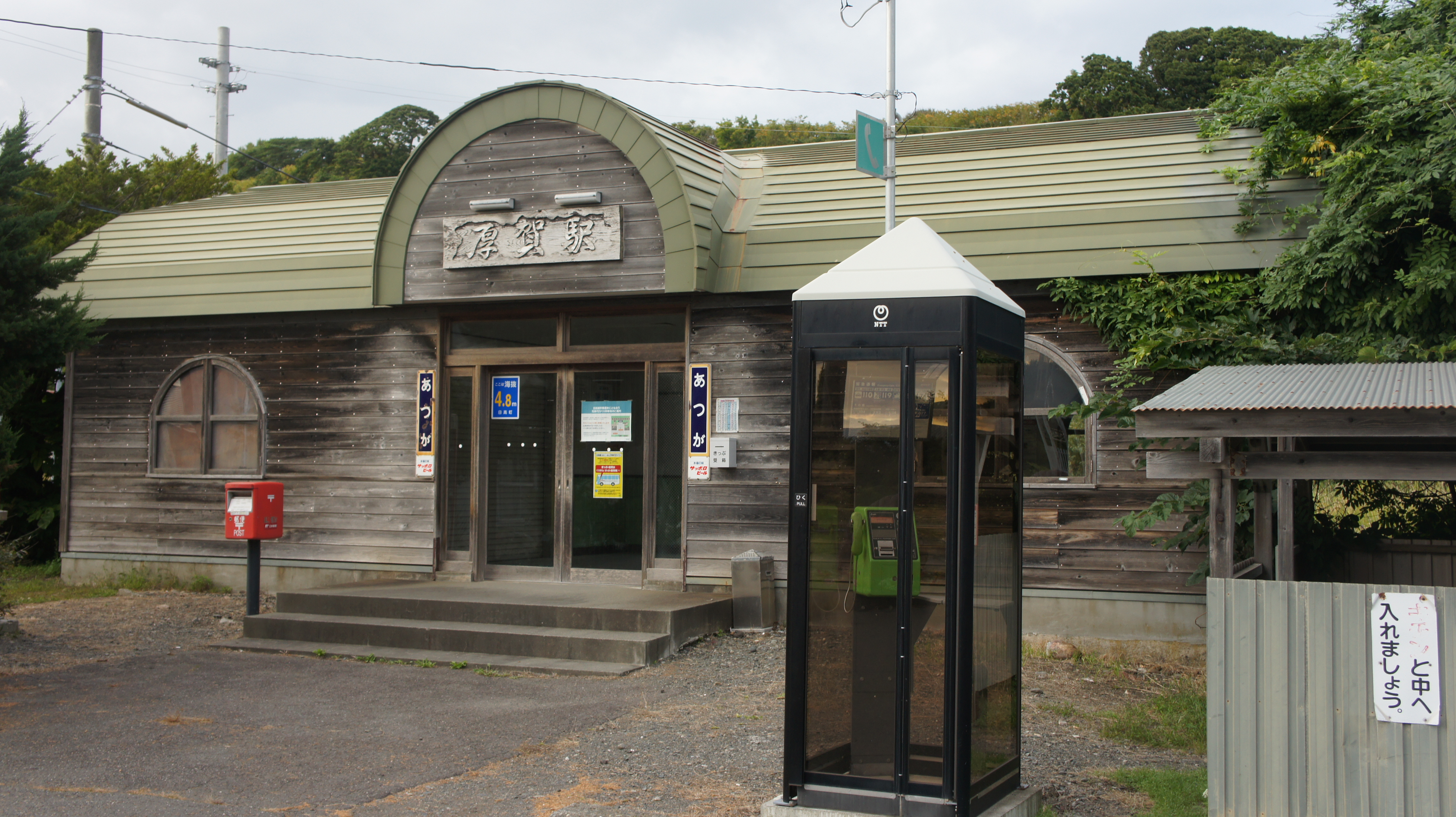 JR日高本線・厚賀駅の駅舎 Sony NEX-3